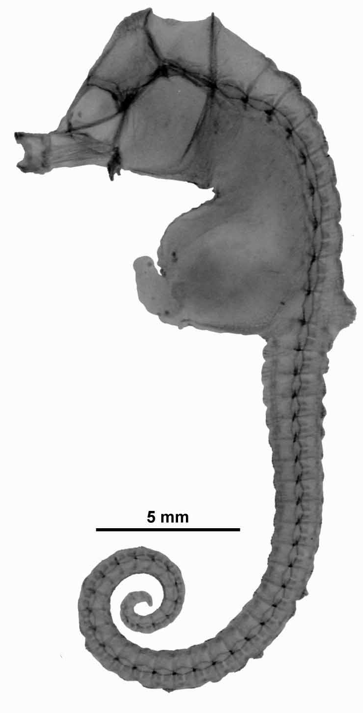 Imagen de rayos X del holotipo de Hippocampus minotaur. Autor: Martin Gomon / Museum Victoria